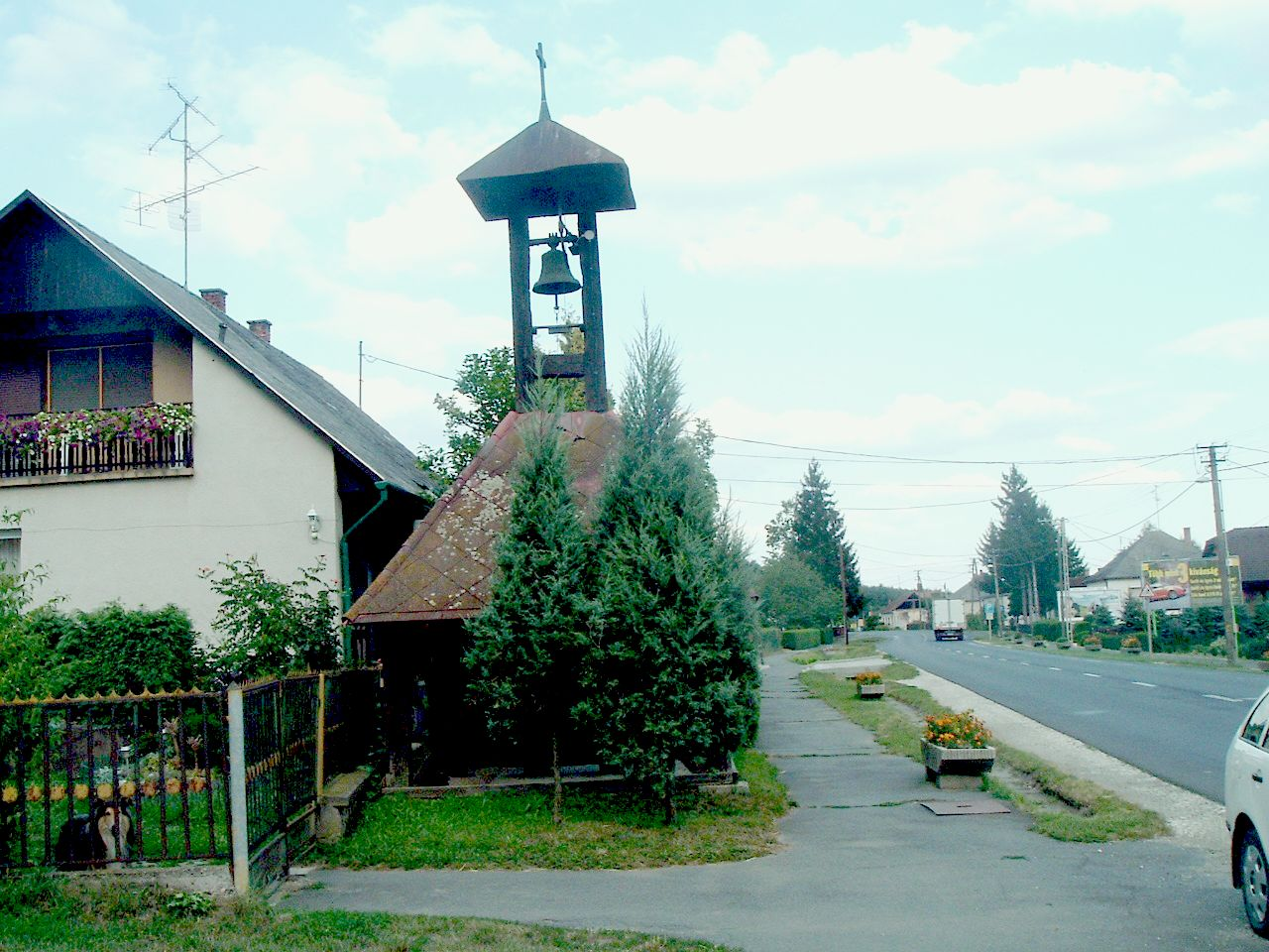 Jakabháza (Szentgotthárd)